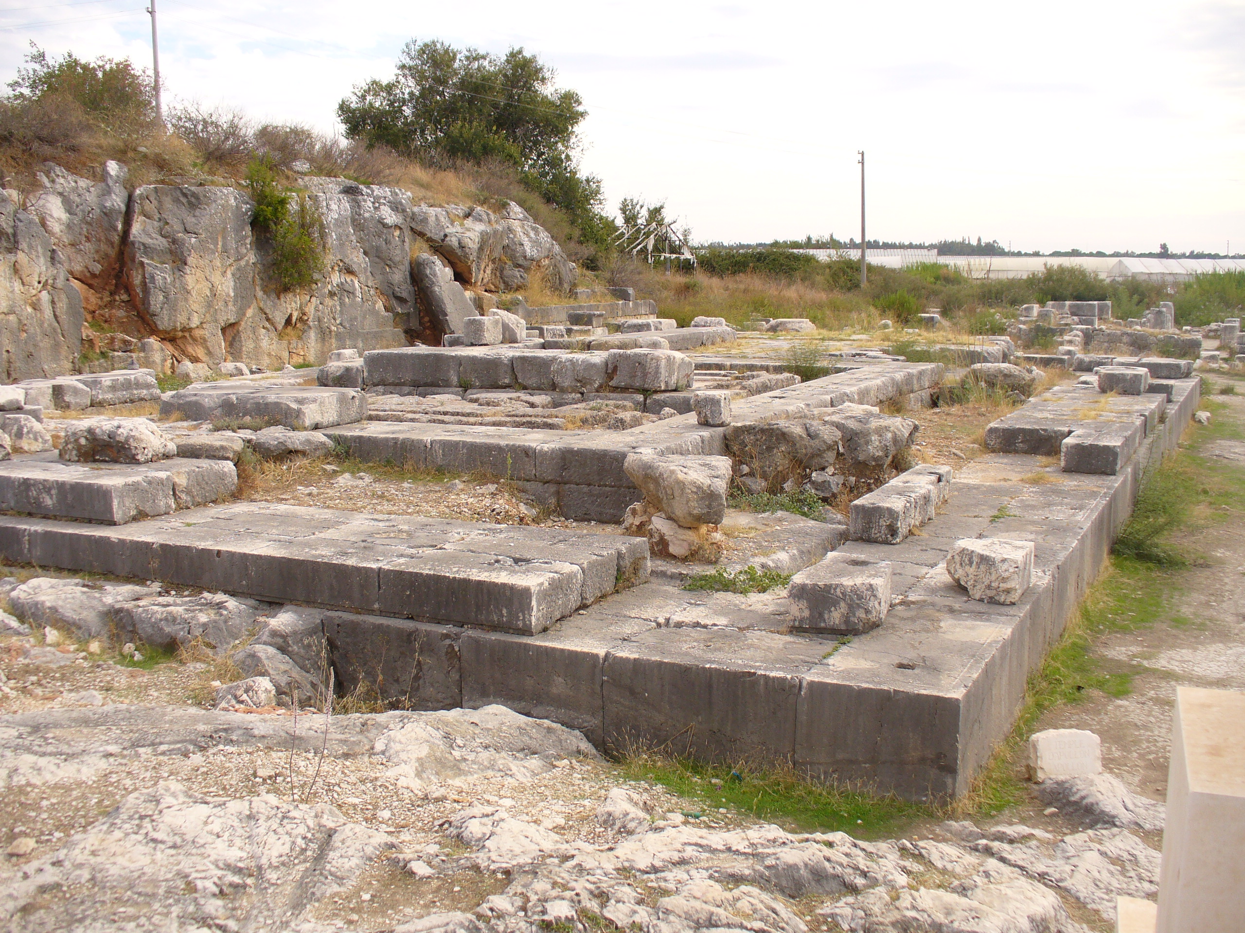 Temple d'Apollon au Létoon, près de Xanthus en Lycie.